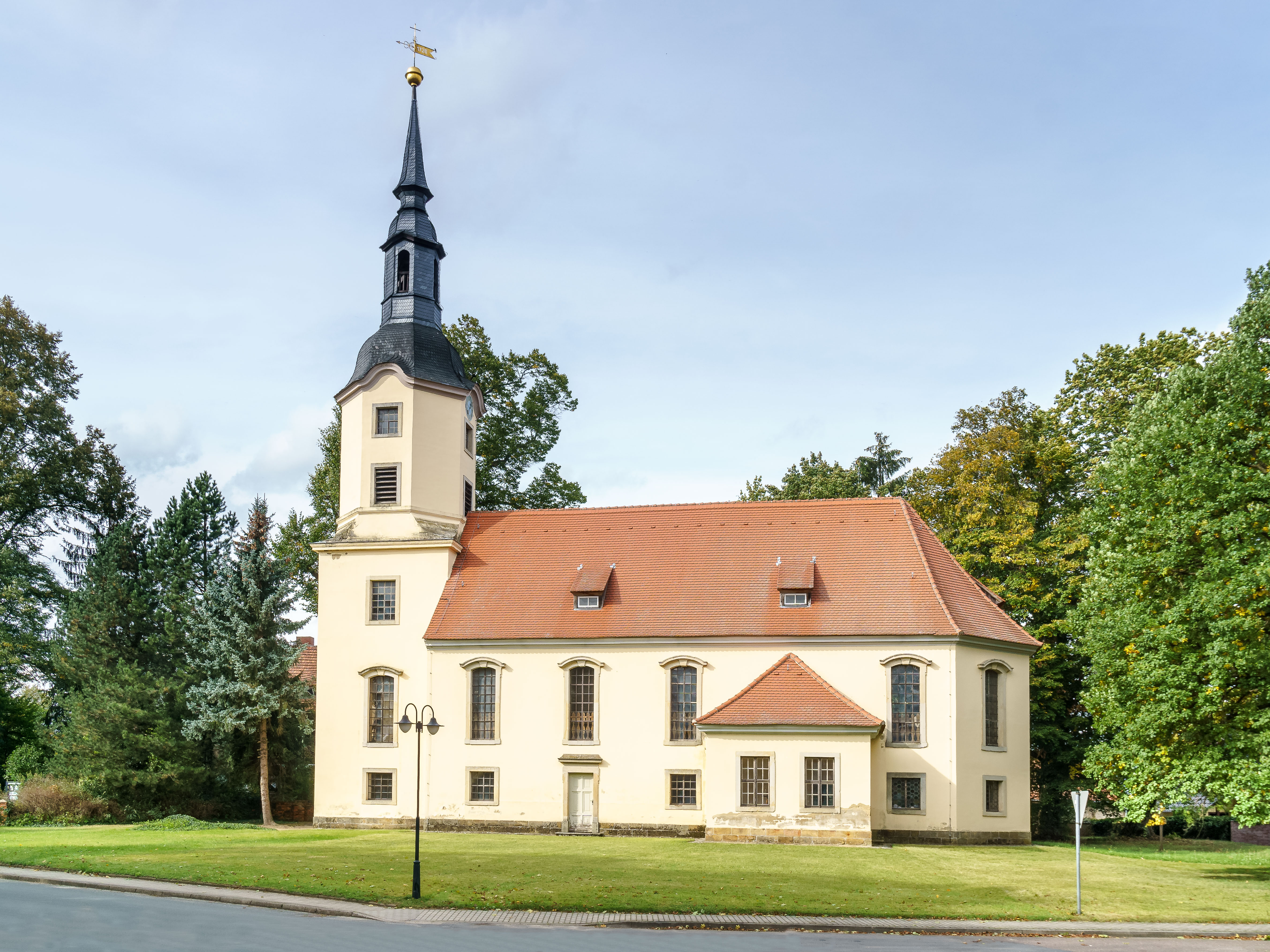 Kirche, Dorfstraße in Lebusa